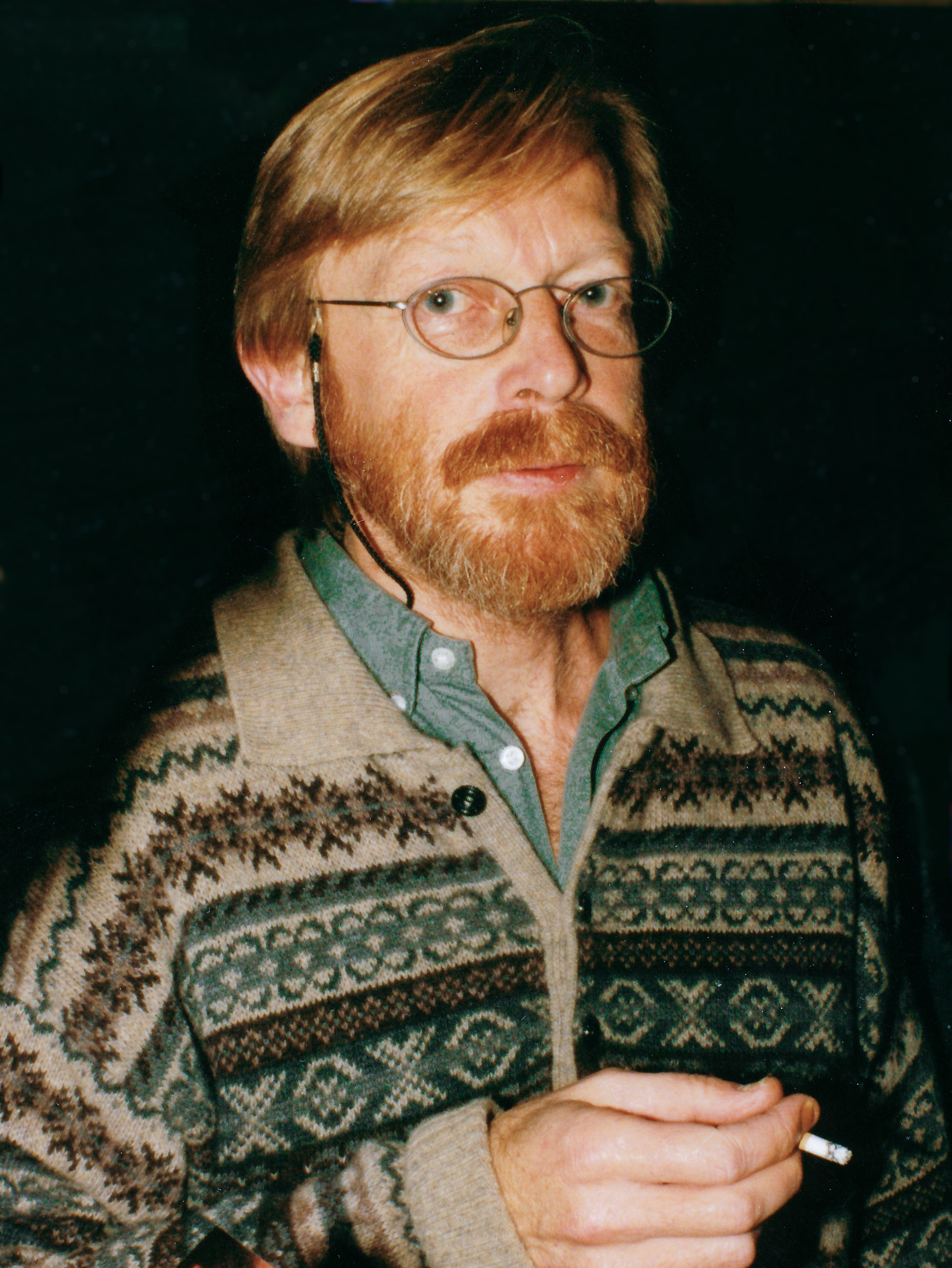 Tomas Löfström på Vagabondfest 1996.